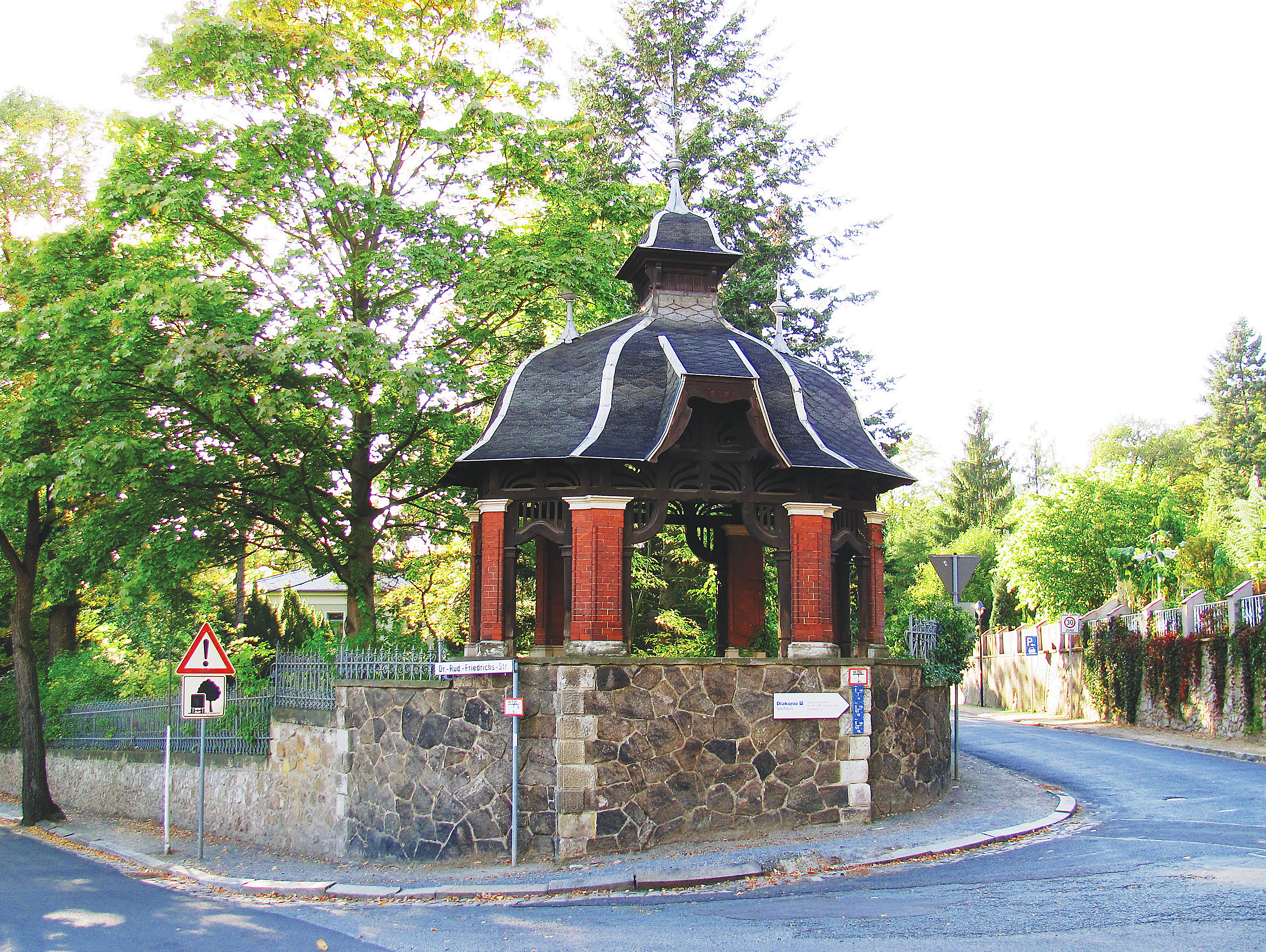 Radebeul, Eckpavillon Obere Bergstraße 1